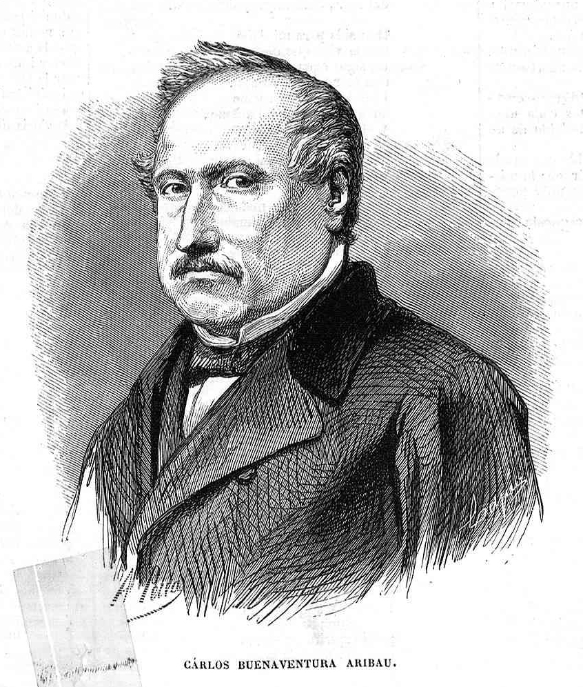 «Carlos Buenaventura Aribau», en la revista española El Museo Universal.